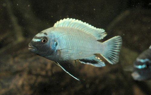 Pseudotropheus, mannetje. Dit is een Cichlide, specifieker een mbuna uit het Malawi meer in Afrika.